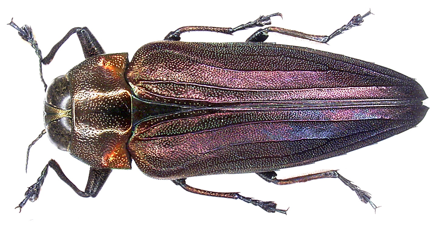 Familie: Buprestidae Grösse: 23 mm Fundort: Indonesien, Batanta Isl., Waywesar leg.det. A.Skale, 2004 Foto: U.Schmidt, 2006